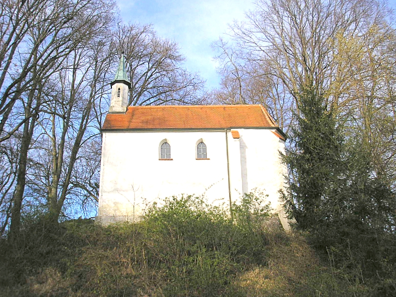 Burg Zusameck über Dinkelscherben (Landkreis Augsburg, Bayerisch-Schwaben). Die Burgkapelle von Südwesten. Eigene Aufnahme, April 2008 / Zusameck castle (Dinkelscherben, Bavaria, Germany). The chapel from the south west. Own photo, April 2008